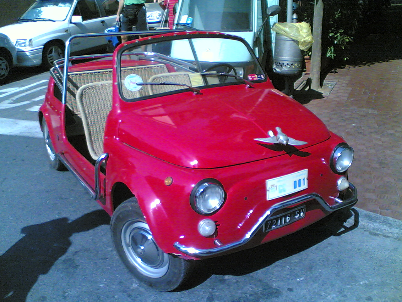 Fiat 500 Ghia Jolly, targata "principato di Seborga"